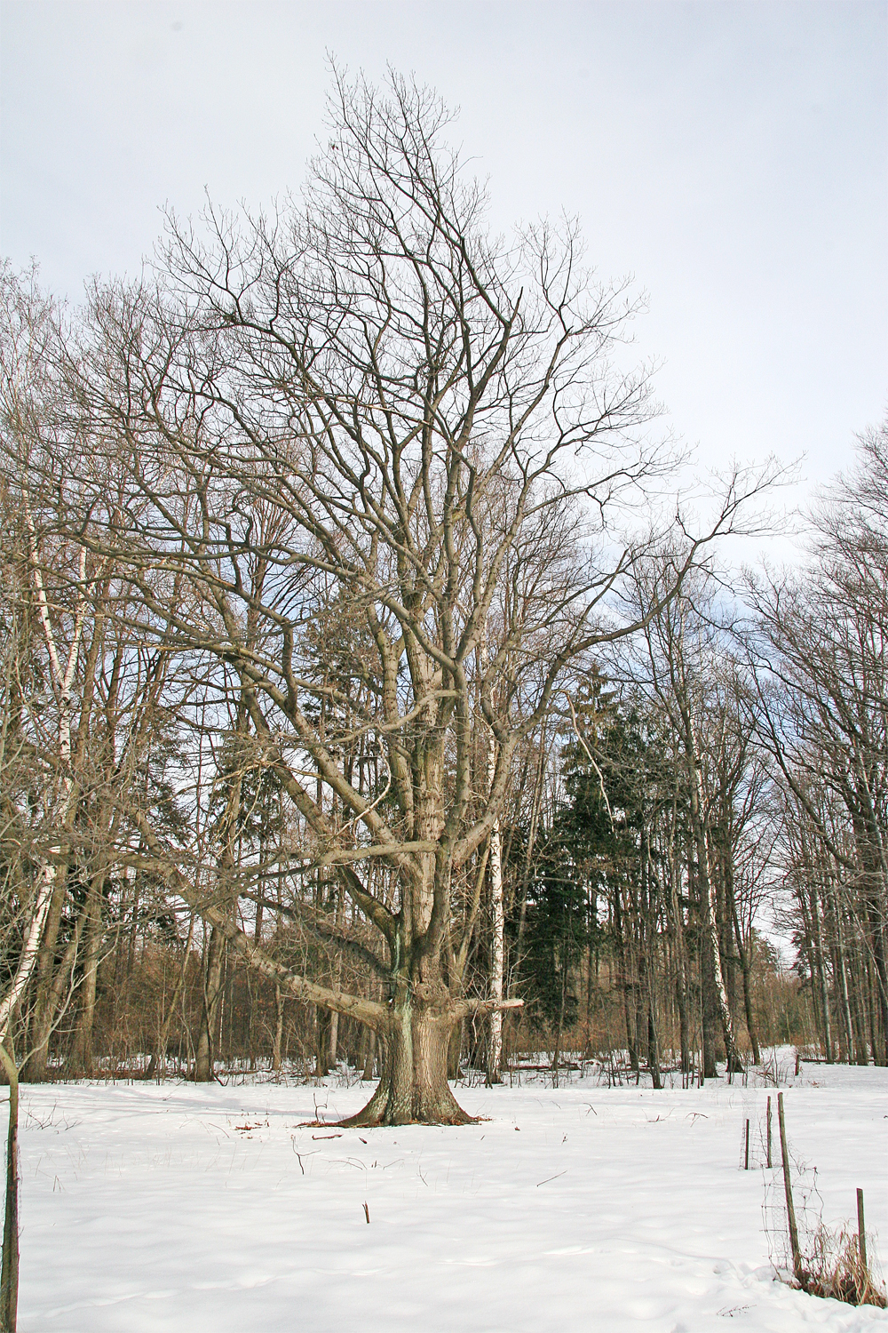 Arboretum Vysoké Chvojno autor:Zp